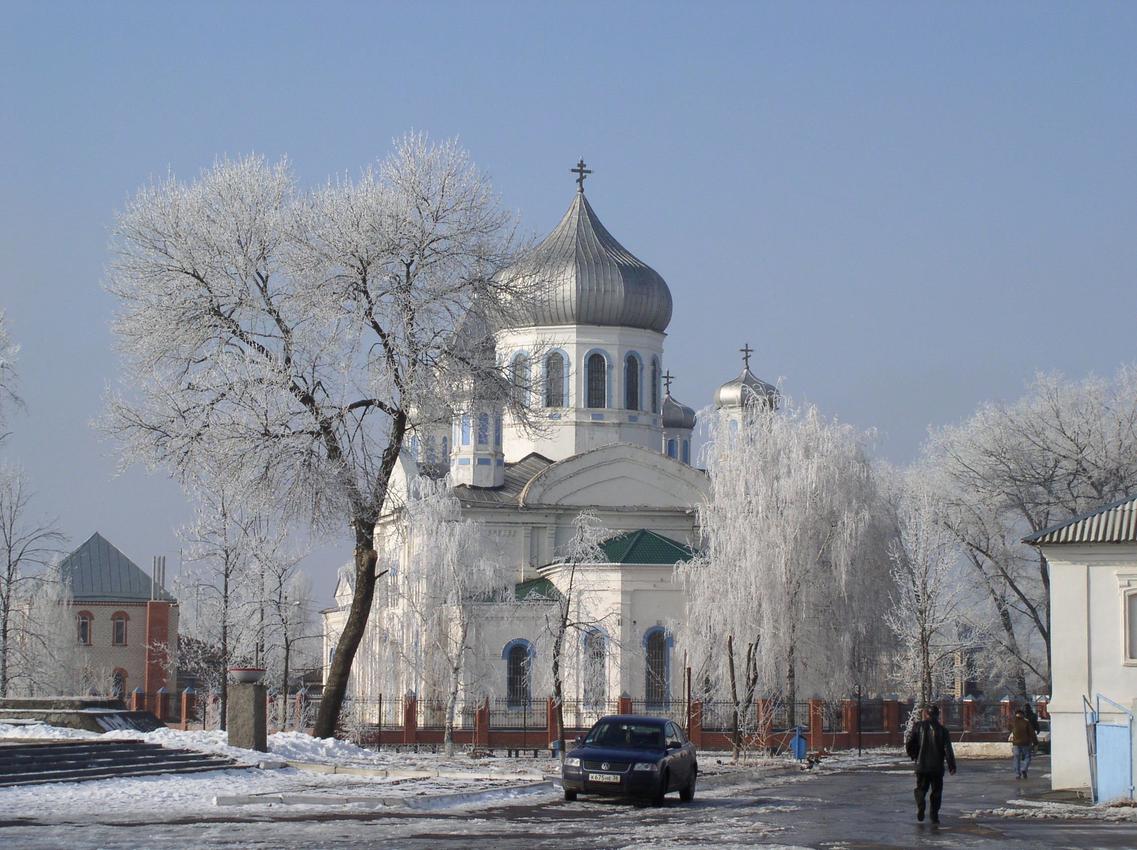 Троицкая церковь: улица Ленина, Кантемировка, Кантемировский район, Воронежская область